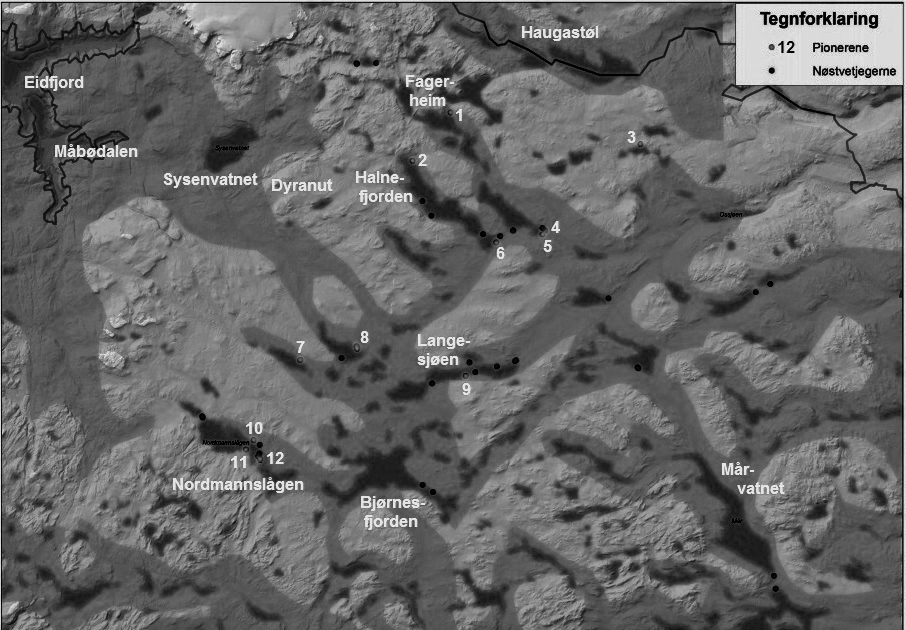 Hardangervidda (1200 m.o.h.). Tidlige jaktlokaliteter (7500-6500 f.Kr. nummerert) og 6500-4000 f.Kr. vesentlig fra Nøstvet-tid.